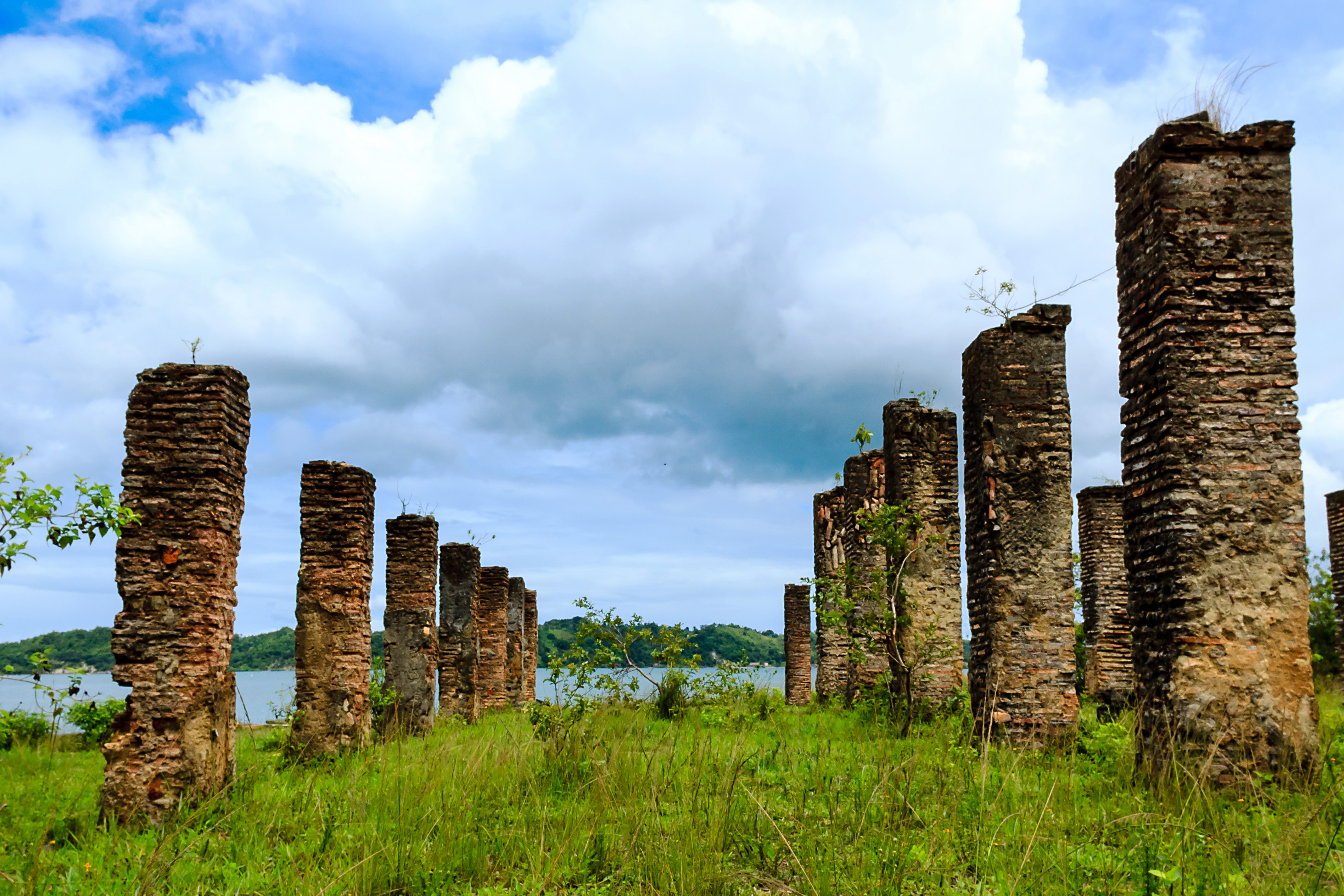 Caboto, Bahia, Brasil.